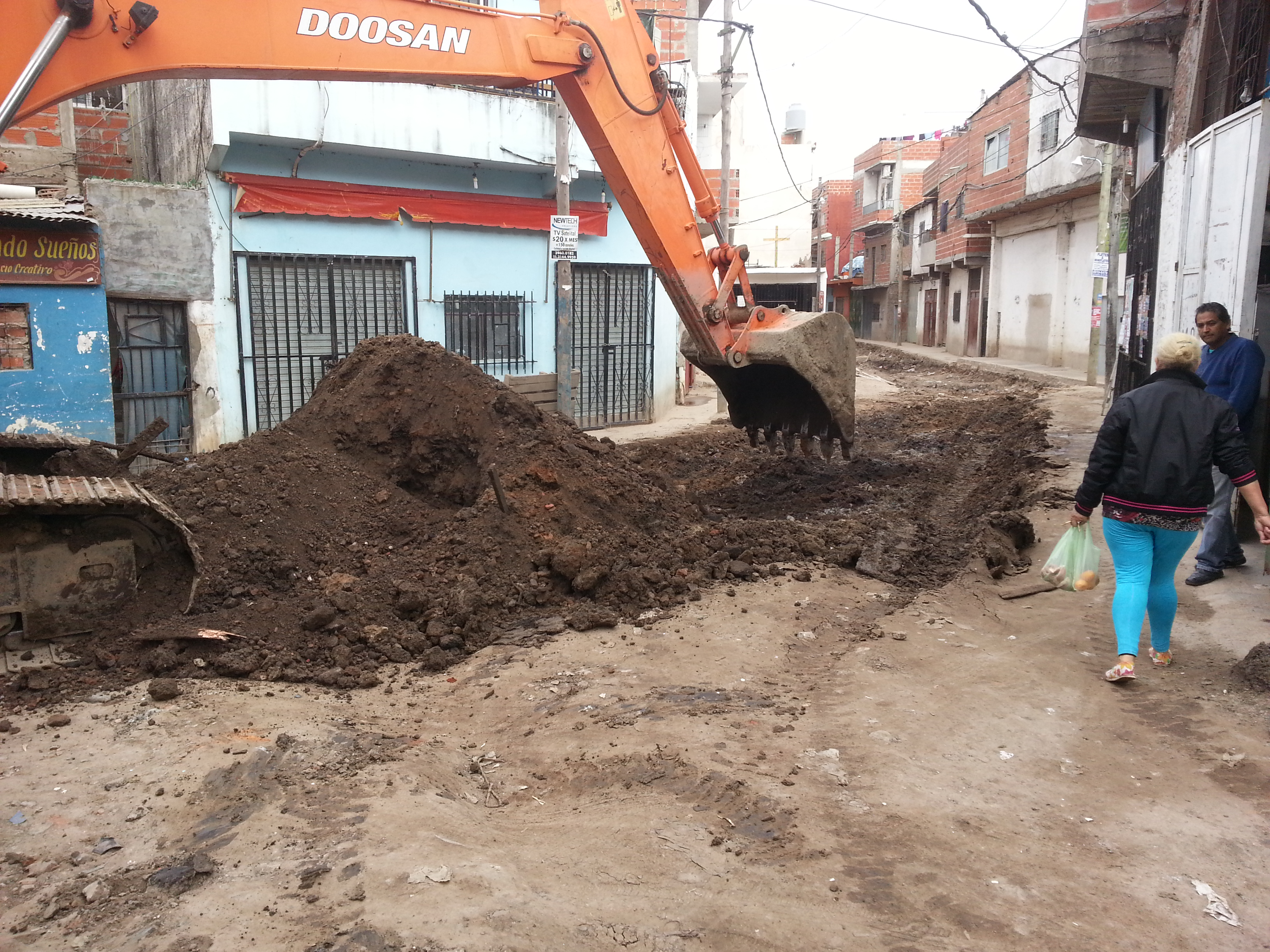 Obras en el barrio Los Piletones, Villa Lugano, Ciudad Autónoma de Buenos Aires.